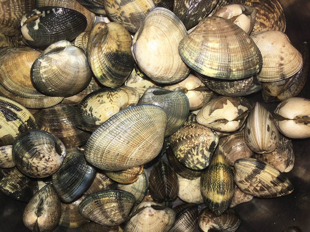 Amasueles de Carril